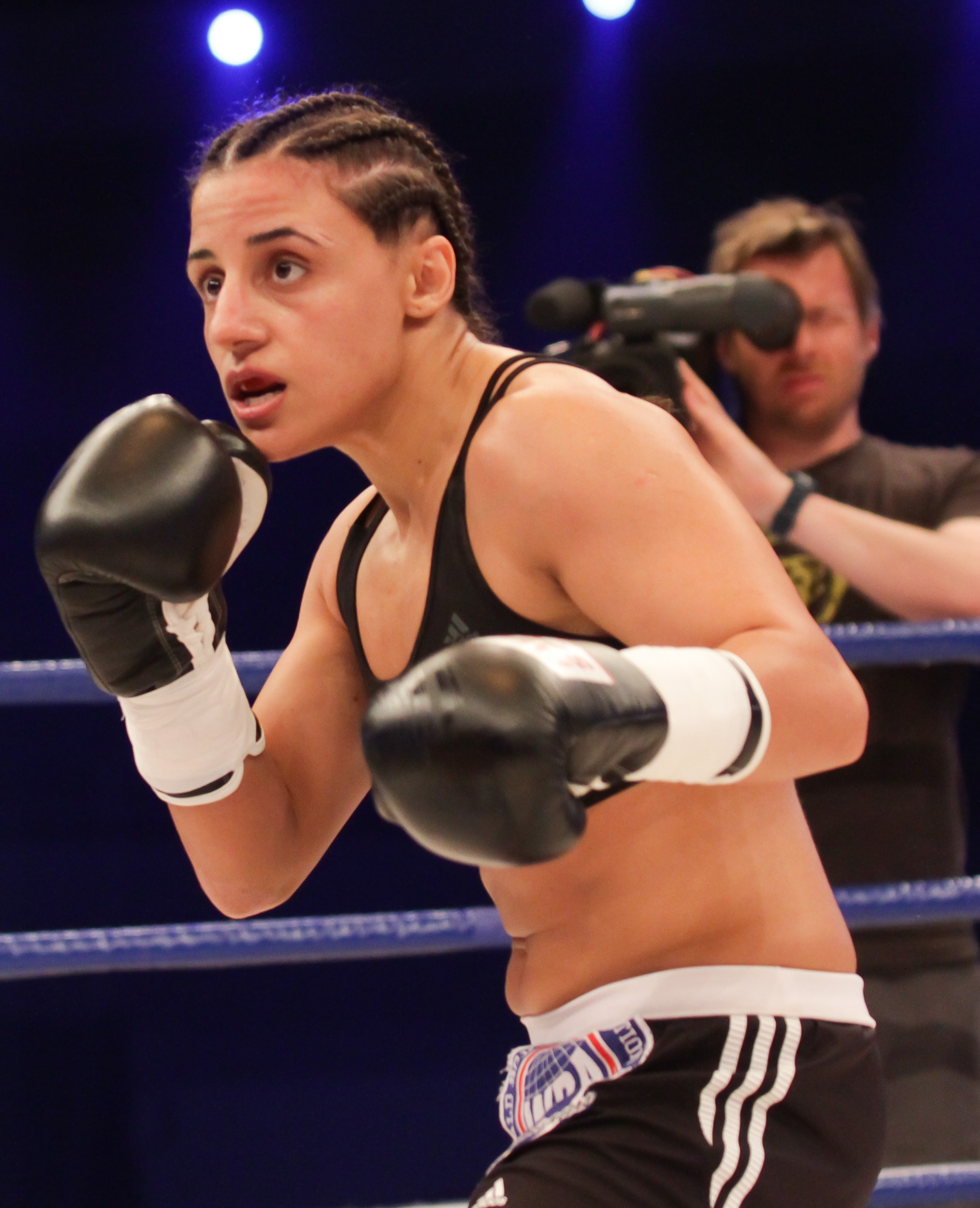 Dortmund, Westfahlenhalle Dortmund, 06.07.2013, „Back to the Top! Susi Kentikian vs. Carina Moreno.